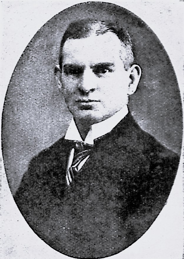 Zweiter Stellvertreter des Wortführers in der Lübeckischen Bürgerschaft.